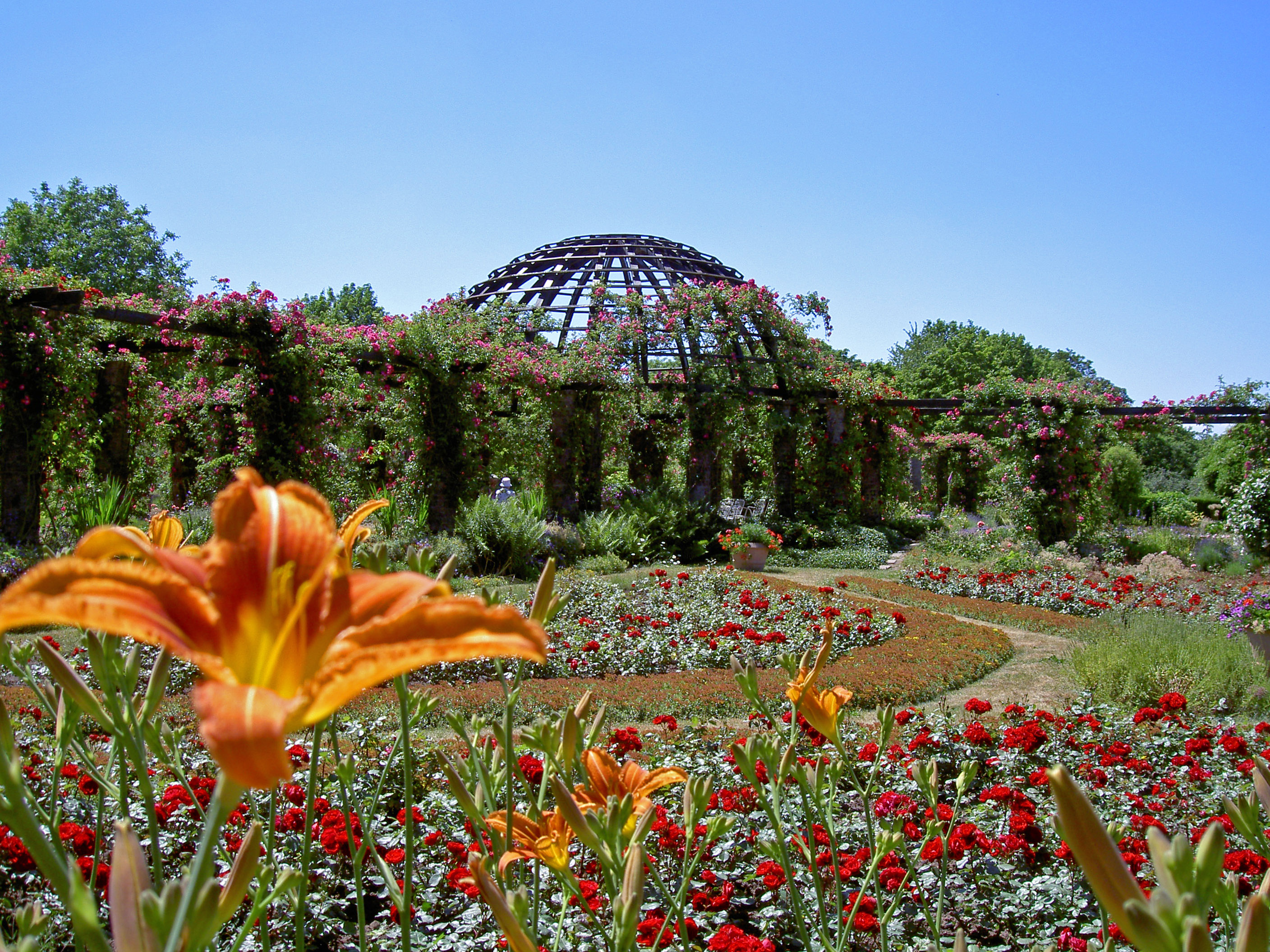 Germany Darmstadt Rosenhöhe Rosarium Rosendom